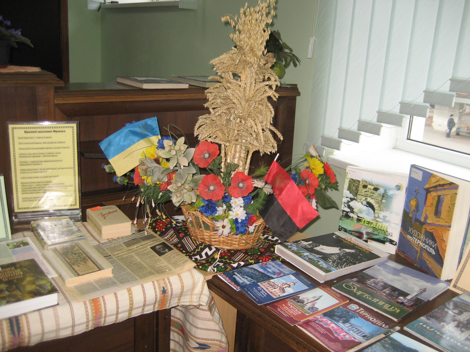 Книжкова виставка приурочена 50-річчю бібліотеки ім.Л.Каніщенка ТНЕУ